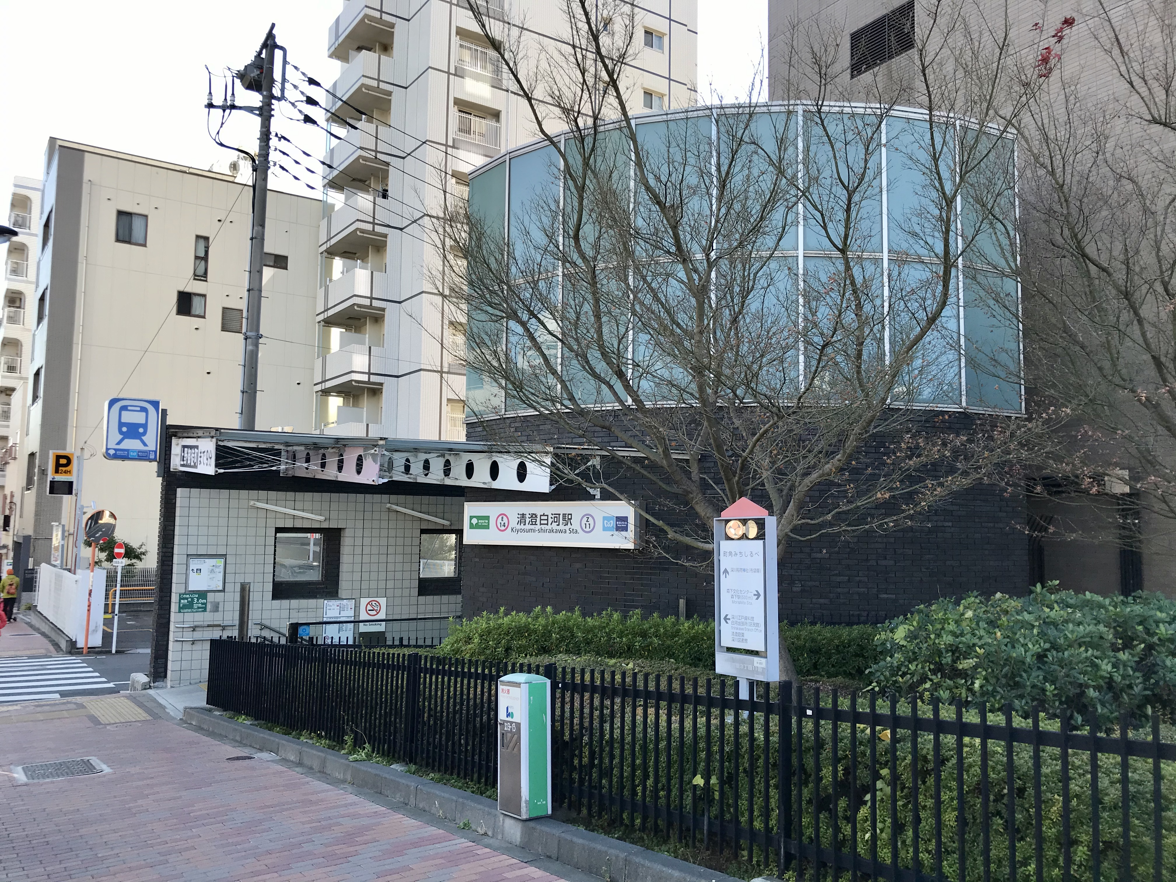 東京メトロ半蔵門線・都営地下鉄大江戸線清澄白河駅A1番出入口